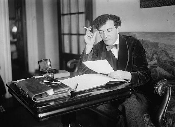 Benno Moiseivitsch (1890 – 1963), Ukrainian pianist